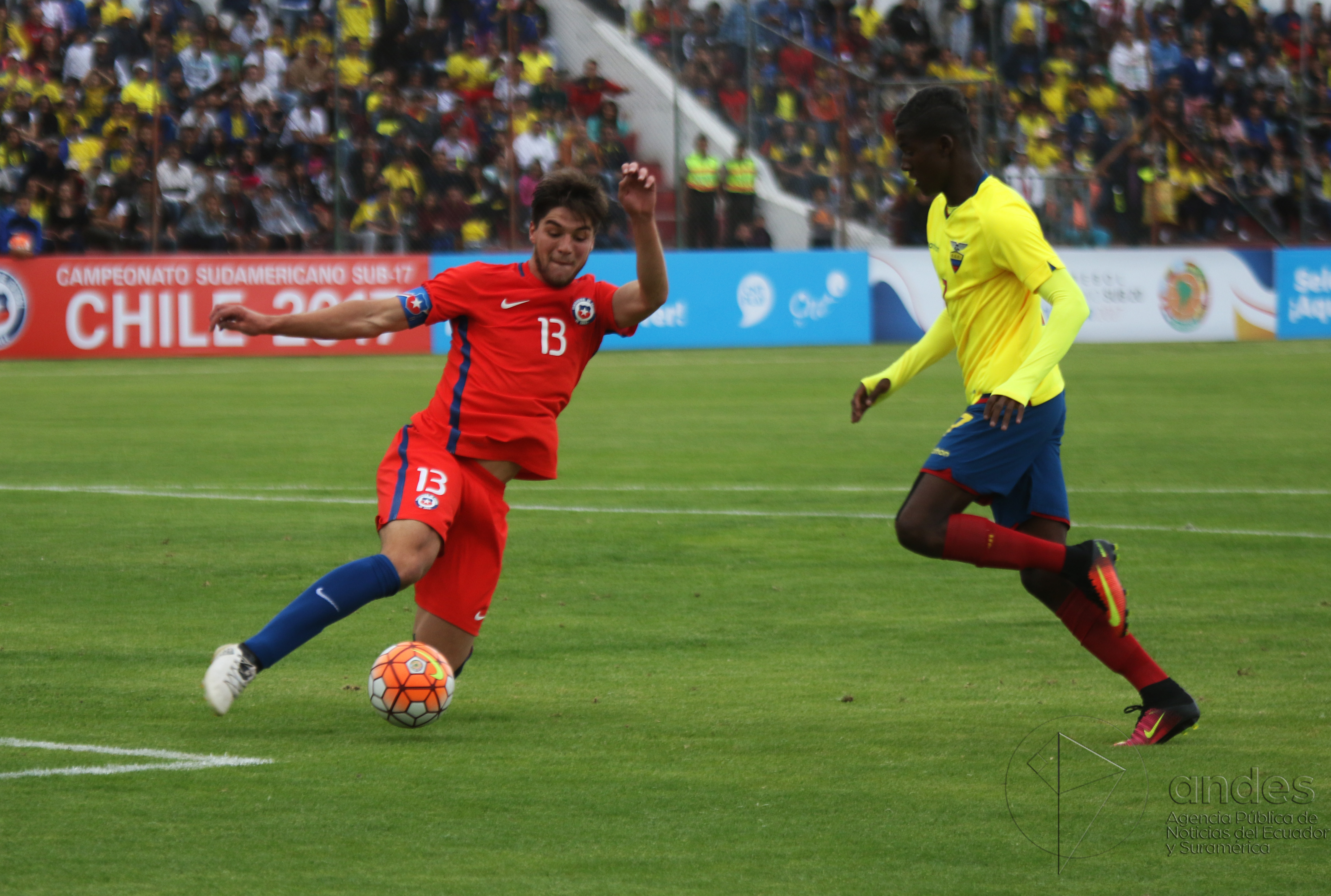 Ambato, Ecuador, 22 enero 2017 (Andes).- Ecuador igualó 1-1 este domingo con Chile en la ciudad de Ambato y dejó vivas las posibilidades de clasificar a la fase final del Campeonato Sudamericano Sub 20 del que es anfitrión, y se alista desde ya para jugar con Paraguay en la última jornada, el jueves próximo, en la ciudad ecuatoriana de Ríobamba. ANDES/Micaela Ayala V.